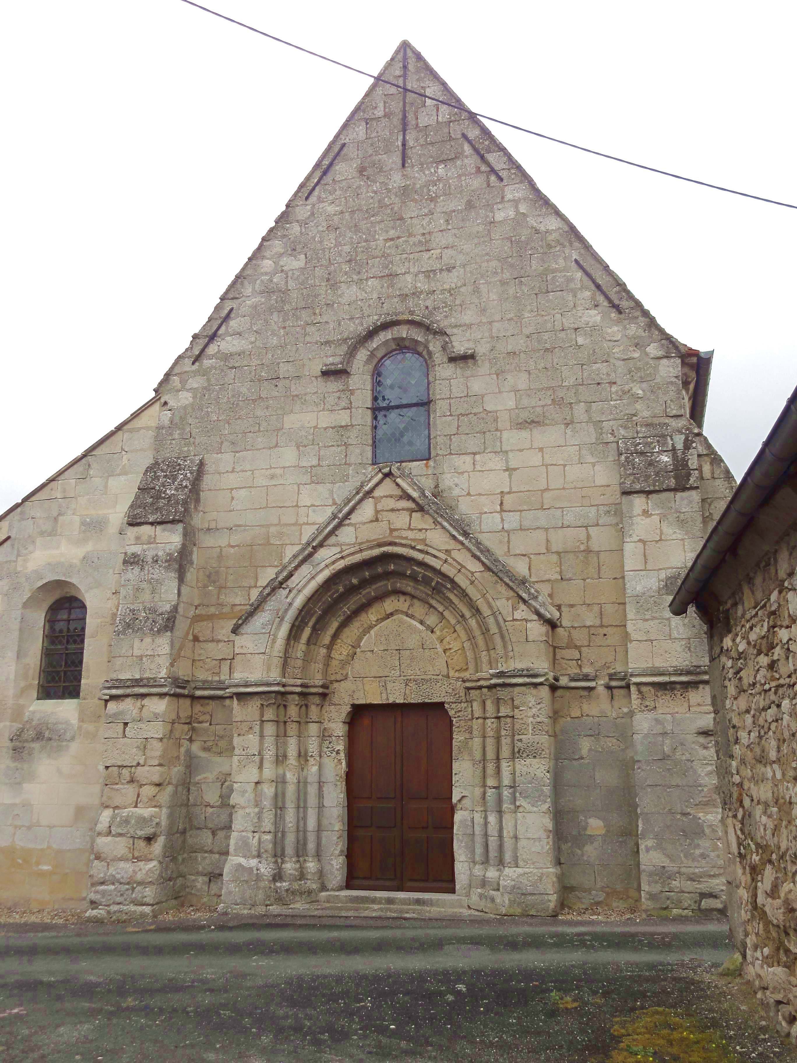 Église Saint-Martin-et-Saint-Léonard de Vez - voir titre.